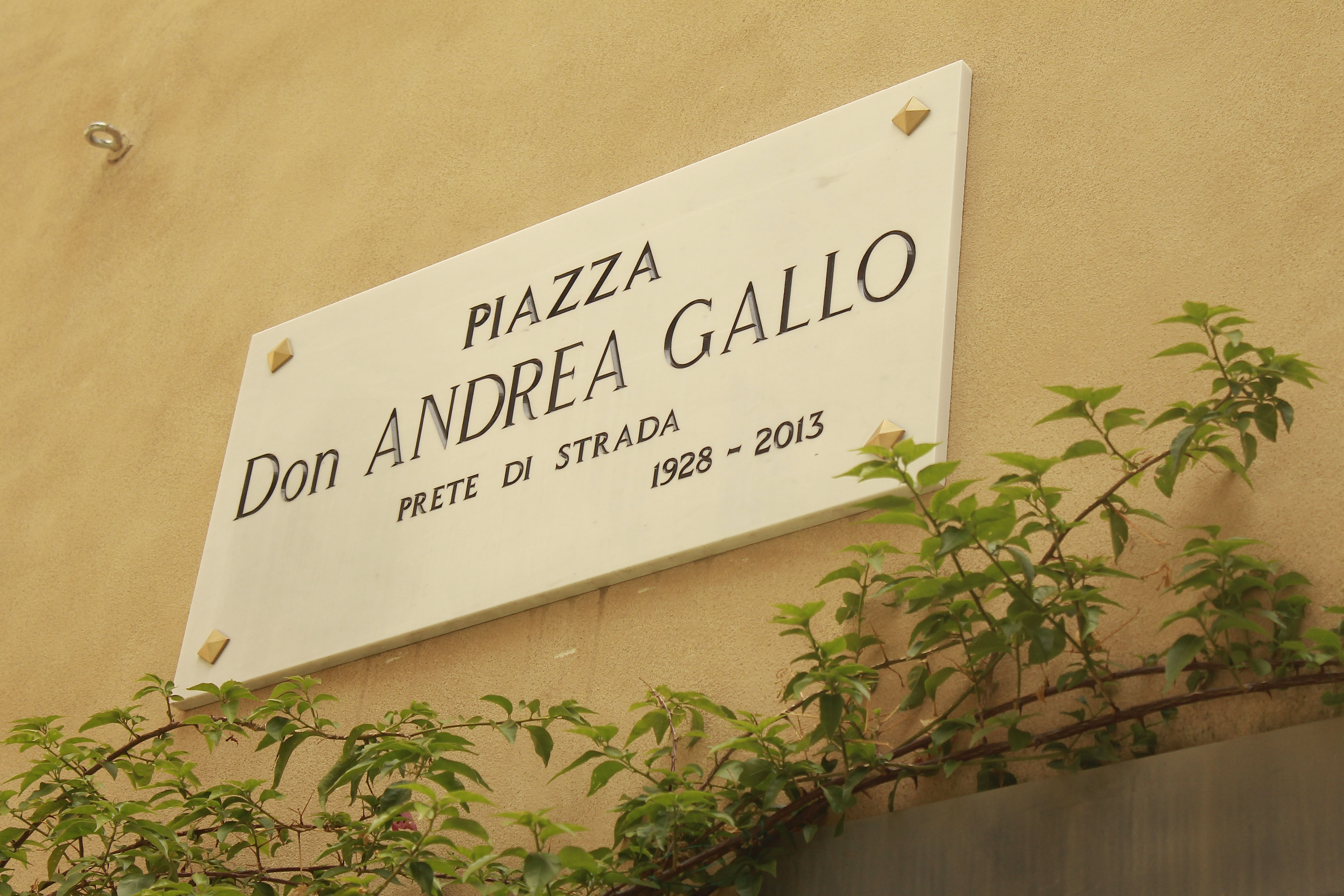 Genova.Piazza Don Gallo.Foto di Andrea Zennaro per Toponomastica femminile